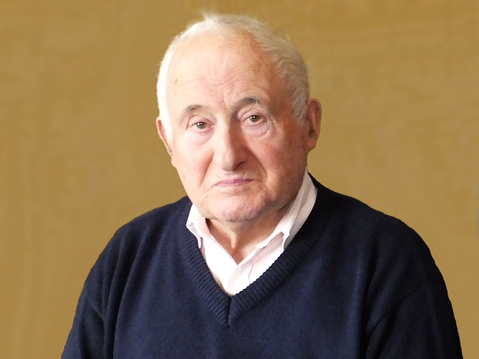 Ks. kanonik Władysław Sługocki - kapelan benedyktynek z Krzeszowa